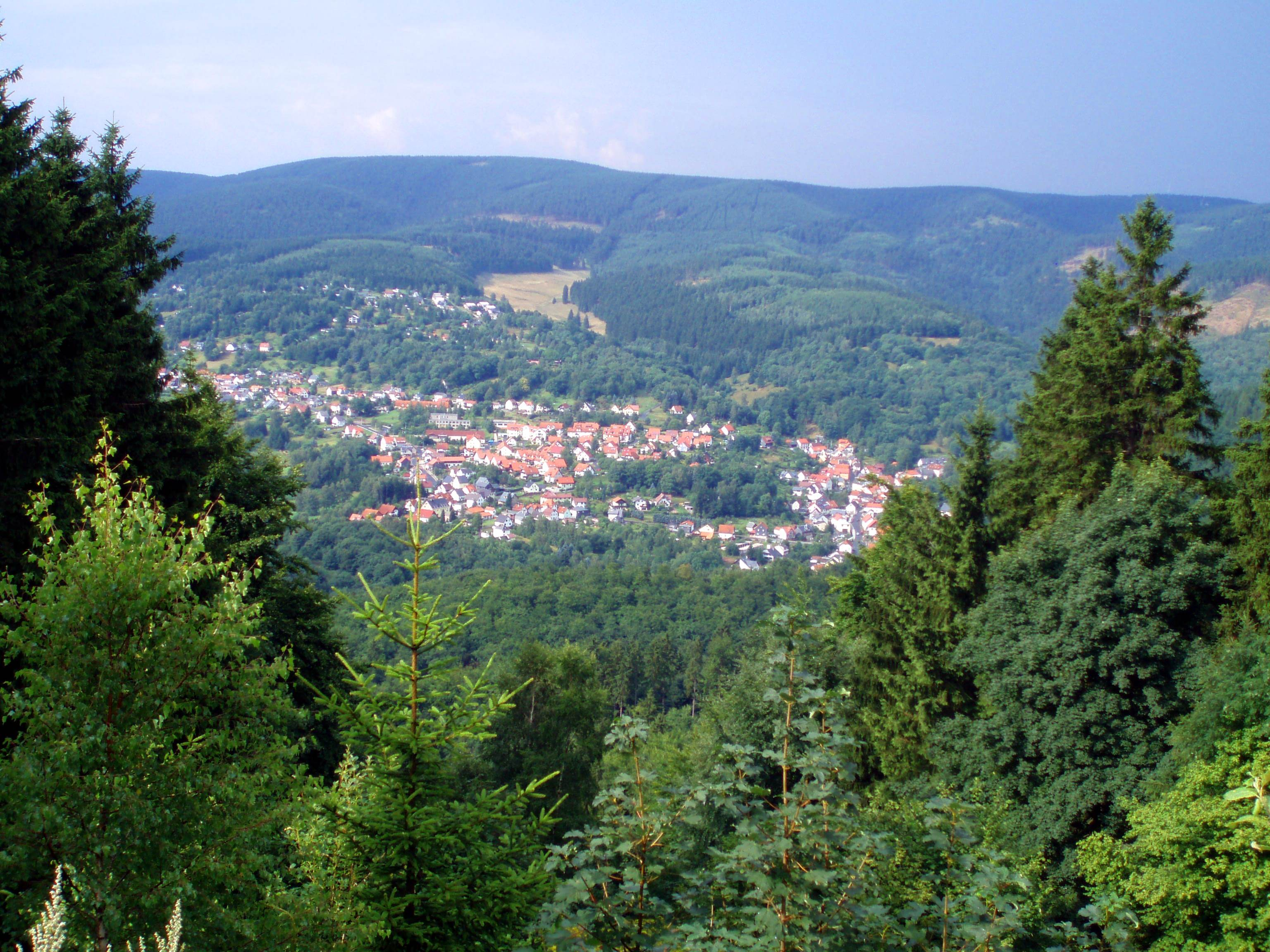 Der Große Beerberg (983 m) und im Vordergrund Suhl-Goldlauter